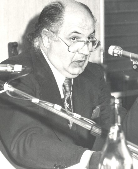 Mariano Aleandri (Ortezzano, 3 settembre 1926 – 2004) è stato un veterinario italiano. Direttore dellp IZSLT M. Aleandri a lui intitolato nel 2014.